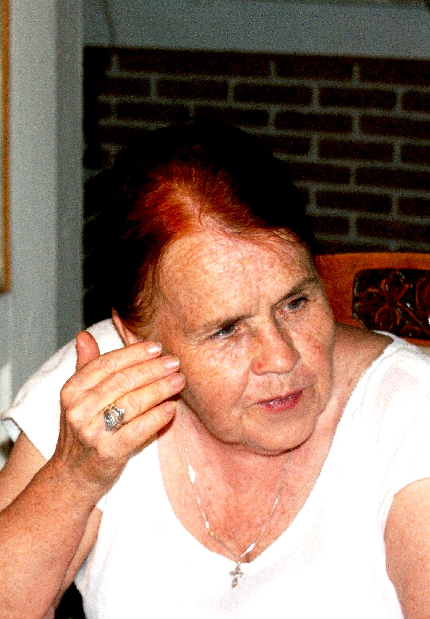 Клят, Валентина Павловна